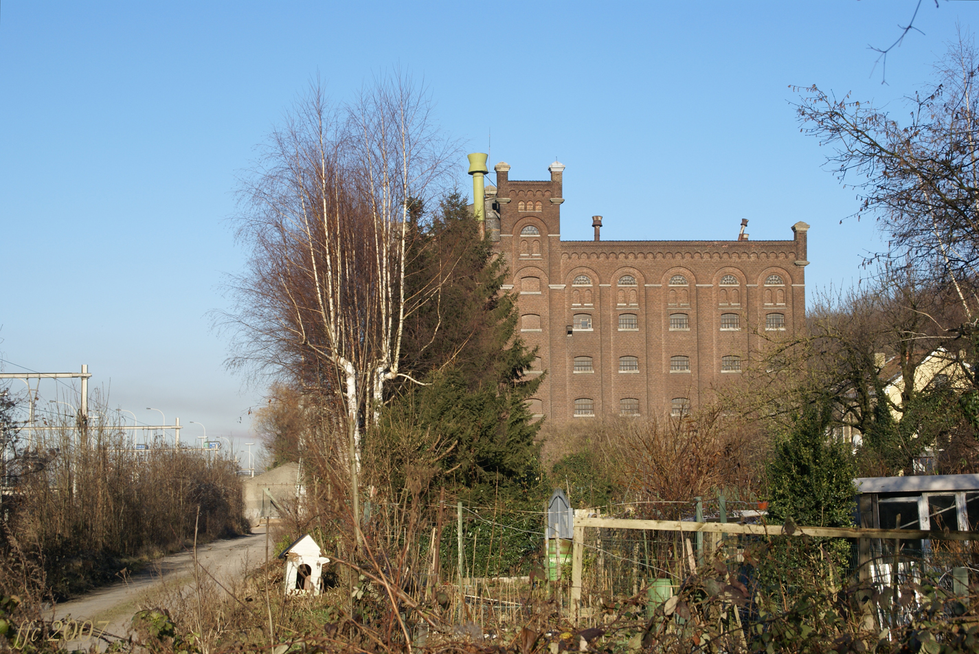 El molí SCAR a Argenteau - Le molin SCAR à Argenteau